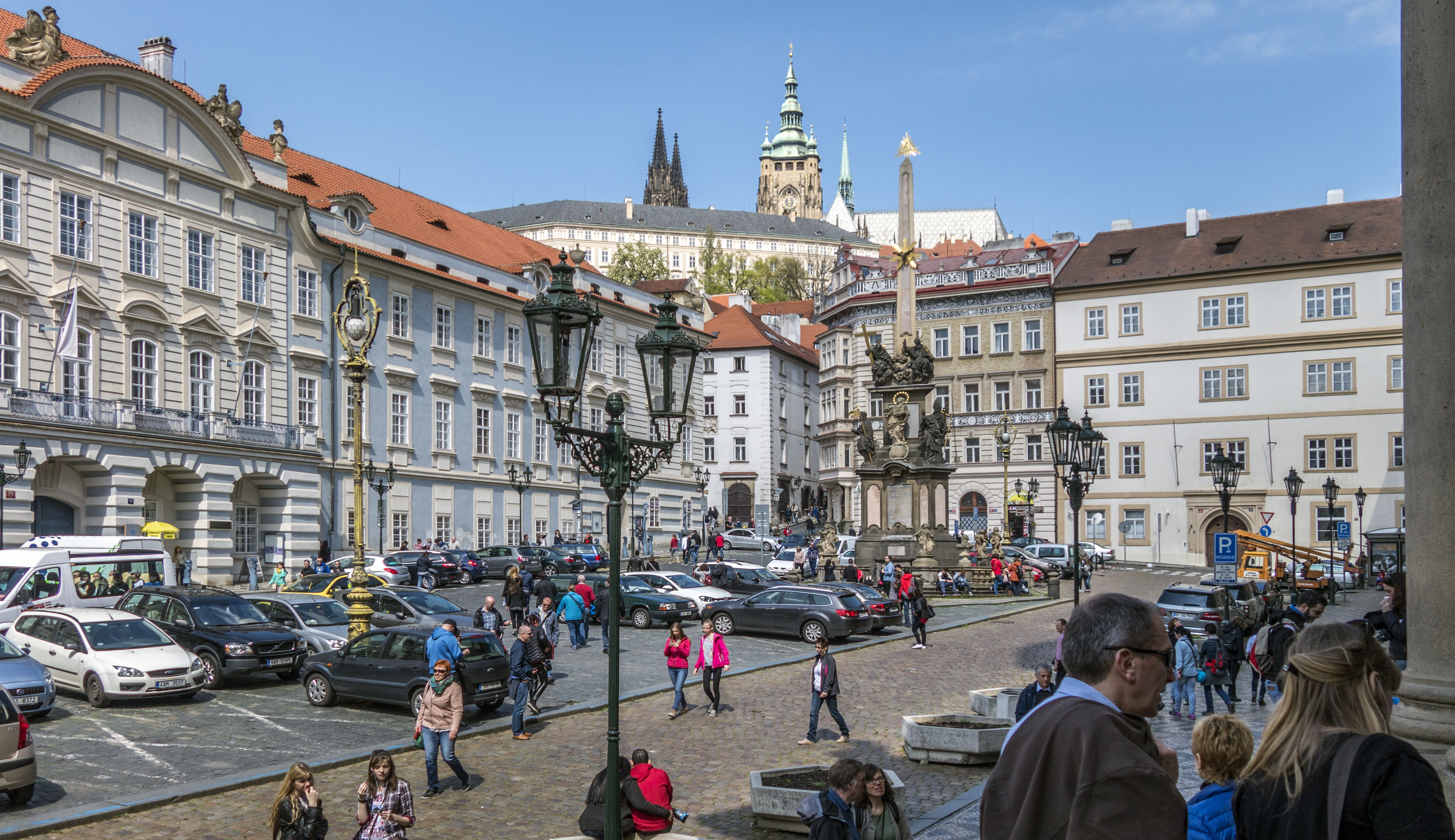 Malostranské náměstí